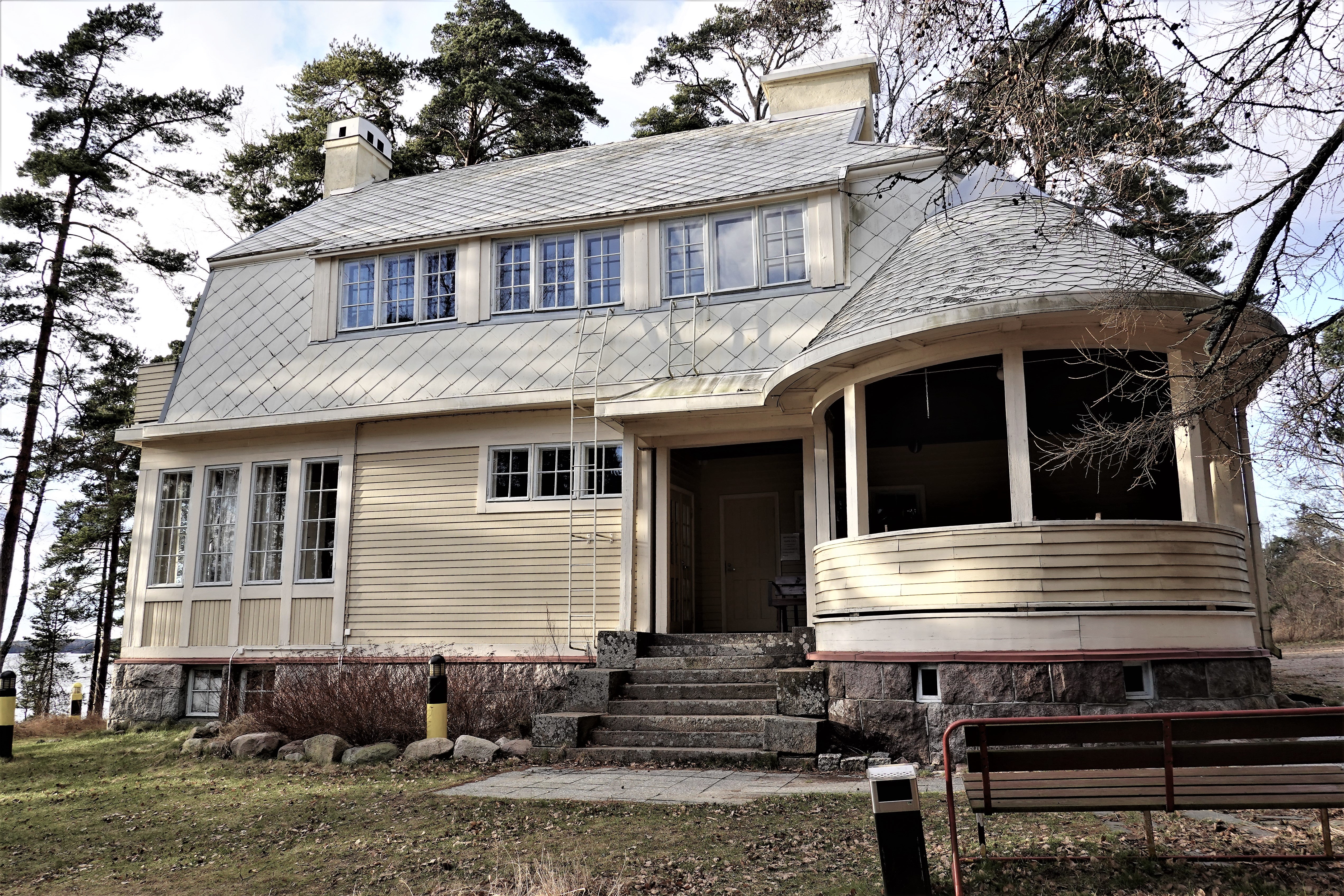 huvila mansardikatto, pääovi